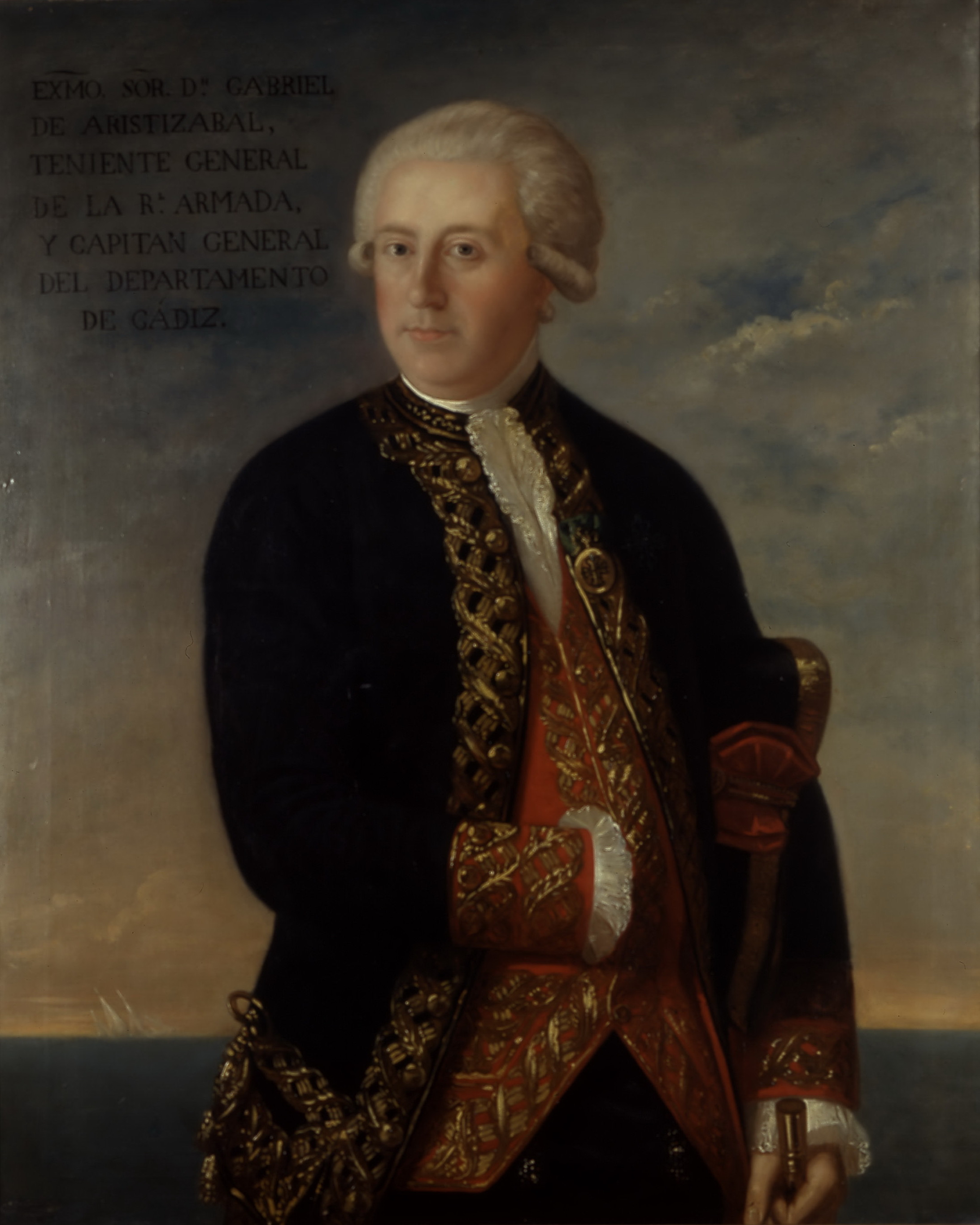 Retrato del marino español Gabriel de Aristizábal y Espinosa (1746-1805), que llegó a ser teniente general de la Real Armada Española y murió en Cádiz el día 5 de junio de 1805, cuatro meses antes de que España sufriera una gran derrota en la batalla de Trafalgar.